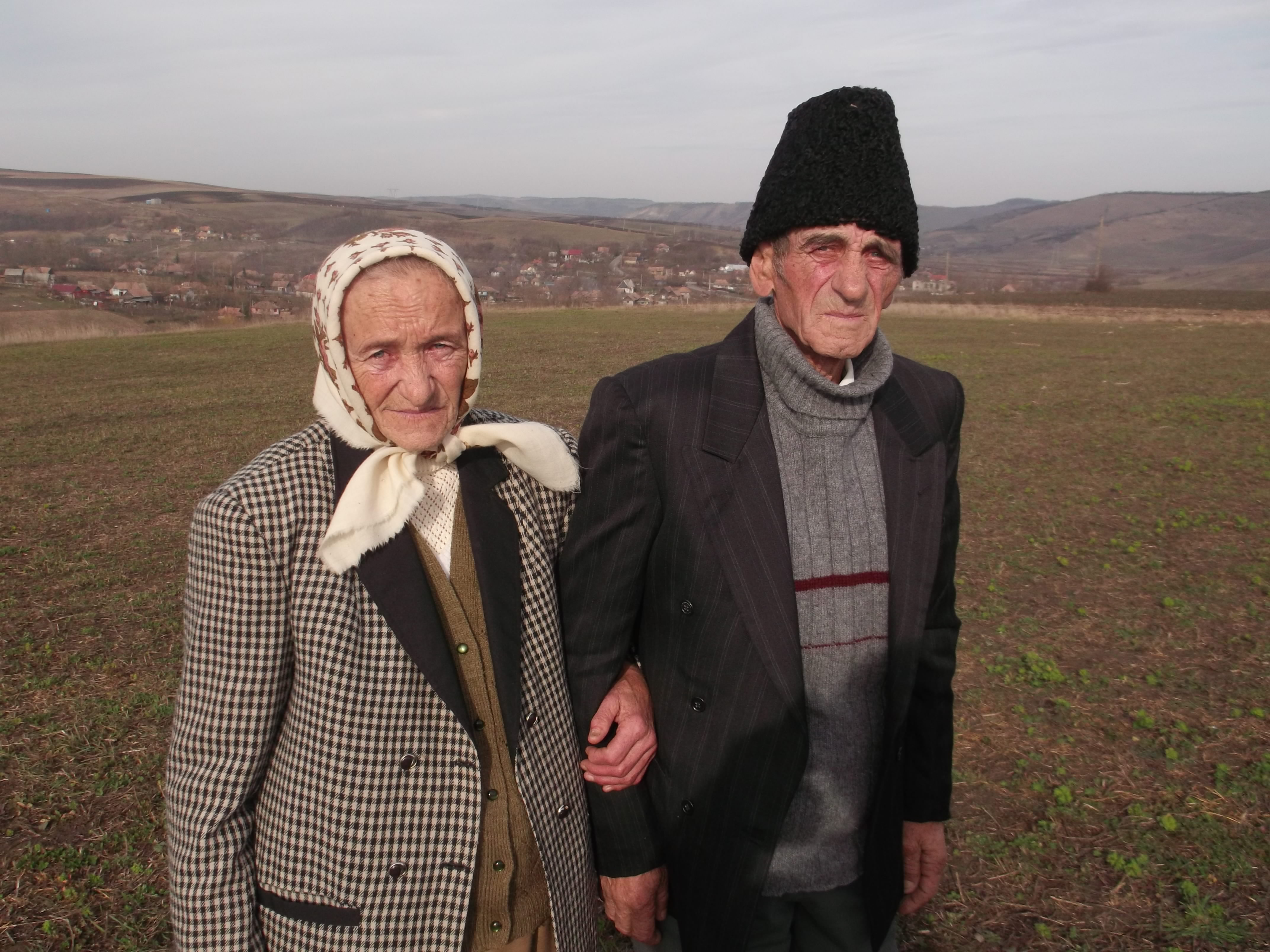 Sateni din Soporu de Campie